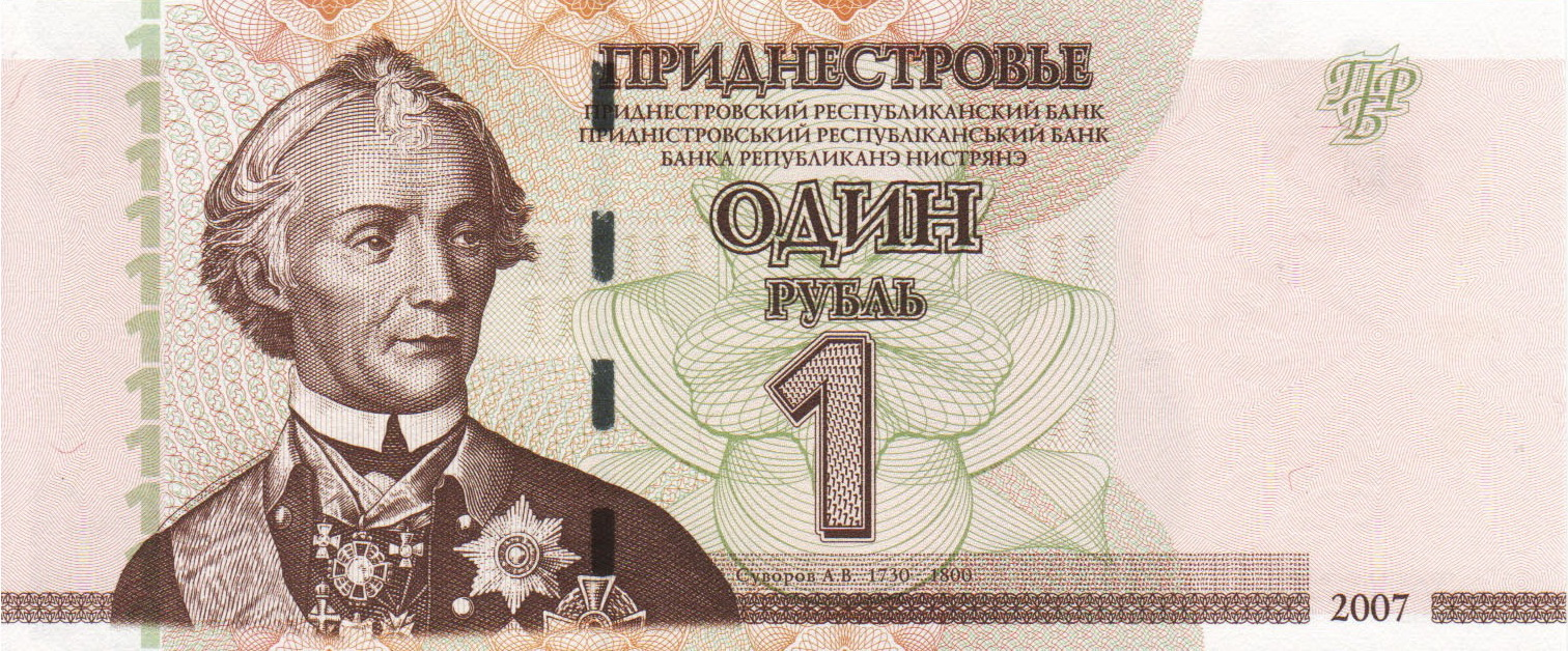 Приднестровский один рубль 2000 года. Аверс. Александр Васильевич Суворов.